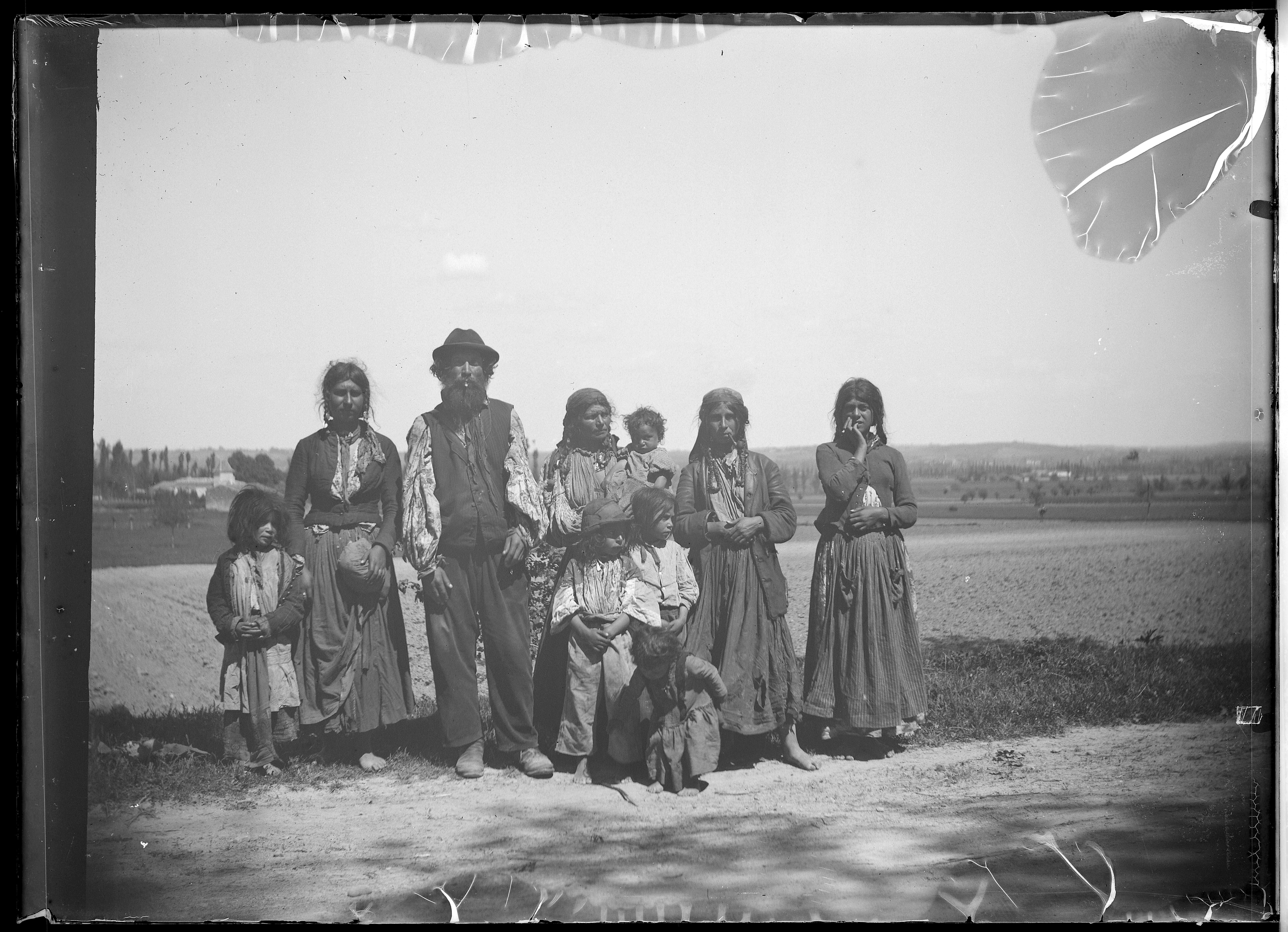 plaque négative au gélatino-bromure d'argent format 13x18cm. inscription manuscrite par Eugène Trutat sur enveloppe : "Une famille de bohémiens"